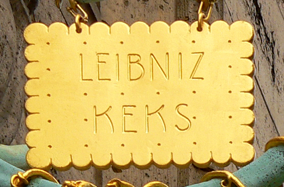 Leibnizkeks